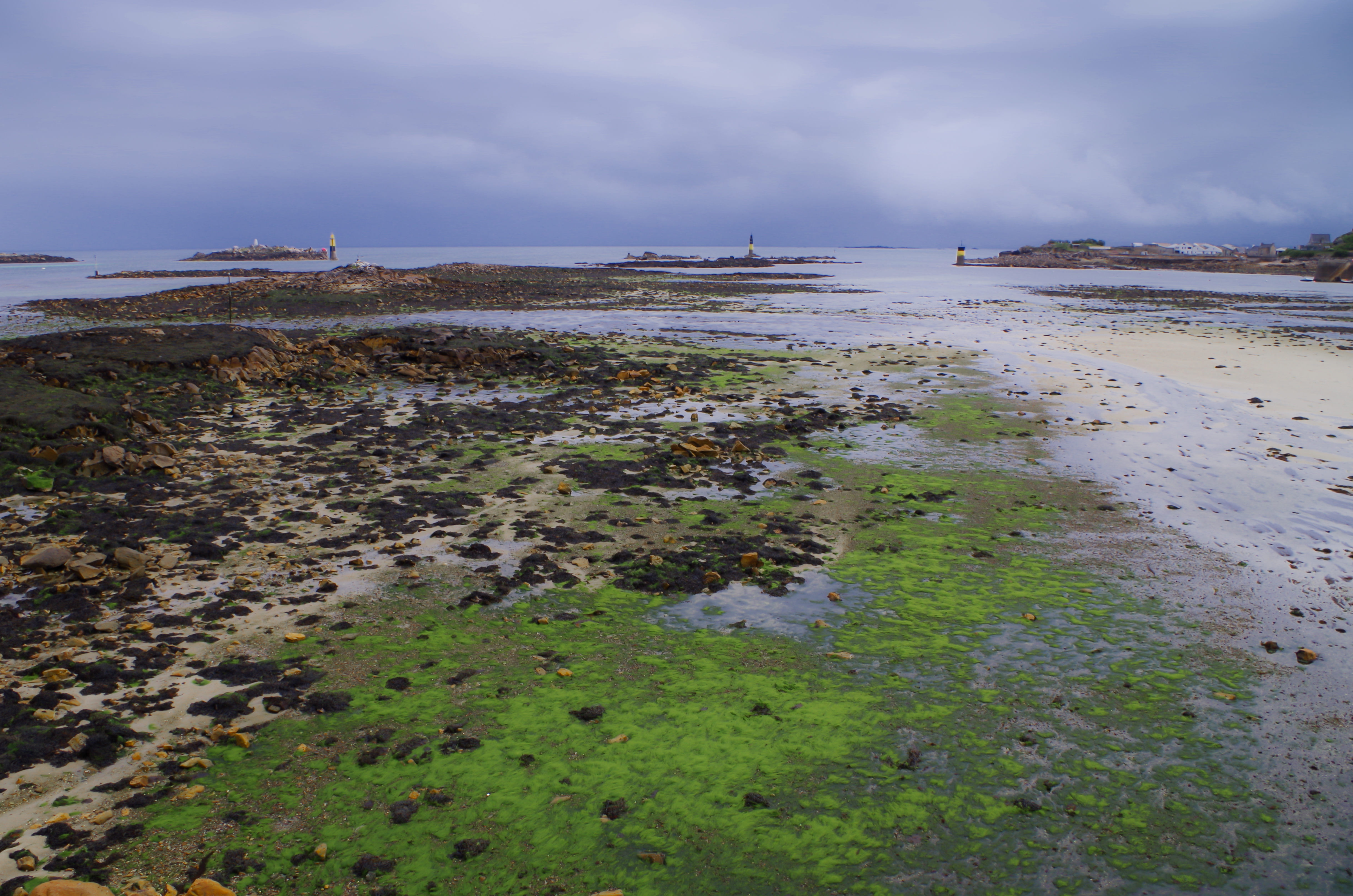 Vue du port de Roscoff à marée basse